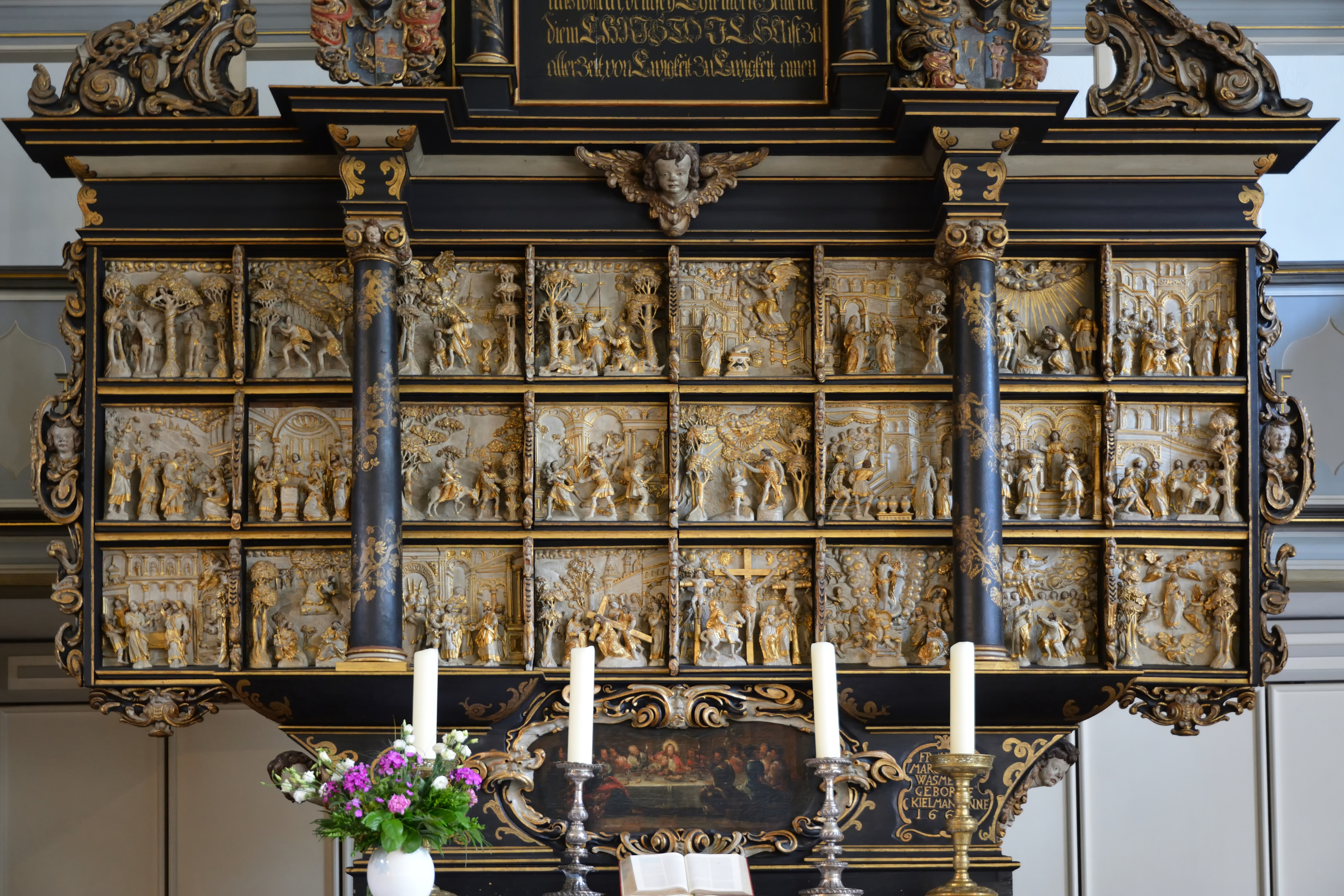 Impressionen aus dem Inneren der Stadtkirche St. Laurentii in Itzehoe